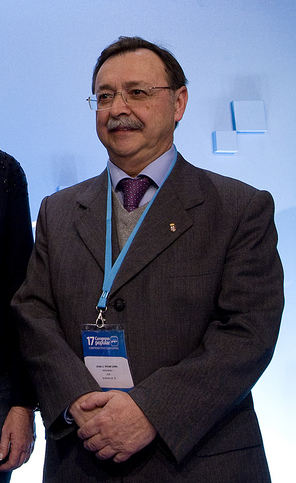 Juan Jesús Vivas, coautor de la ponencia sobre Europa y política exterior 'Comprometidos con Europa' en el 17 Congreso del PP